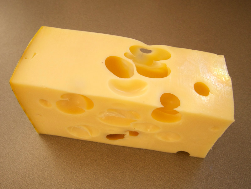 Maasdam cheese